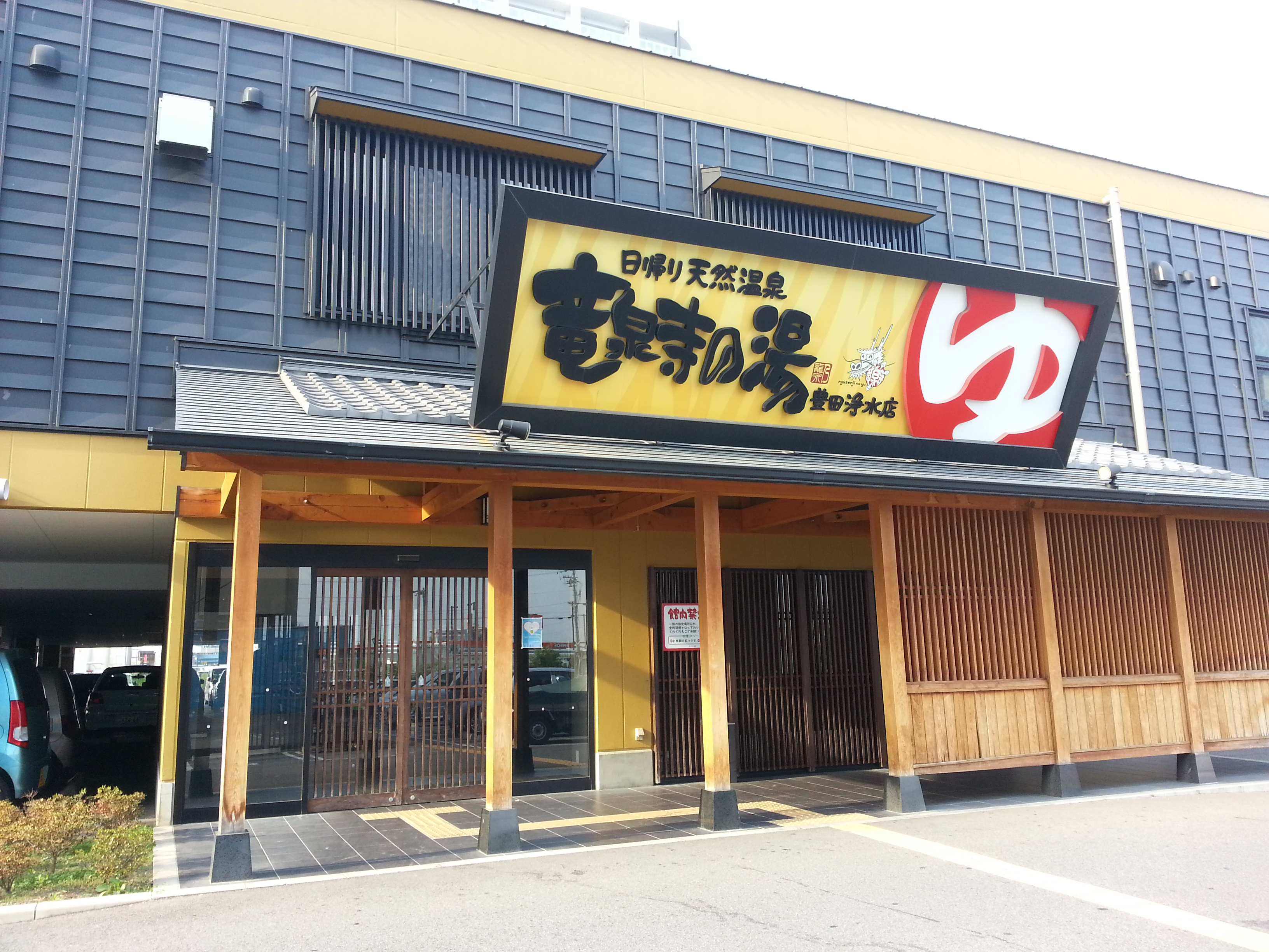 竜泉寺の湯 豊田浄水店の外観。